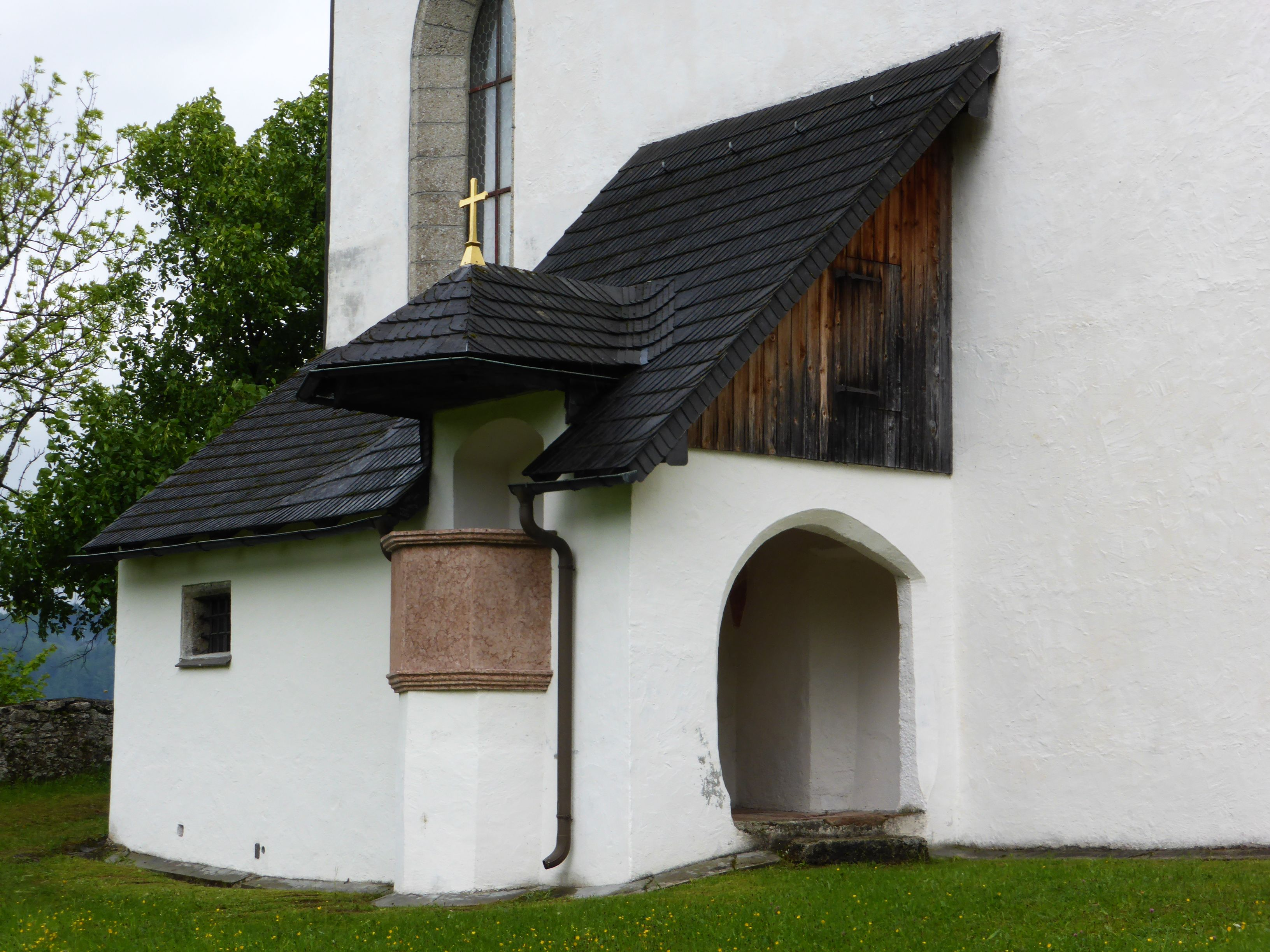 Kath. Filialkirche hl. Nikolaus